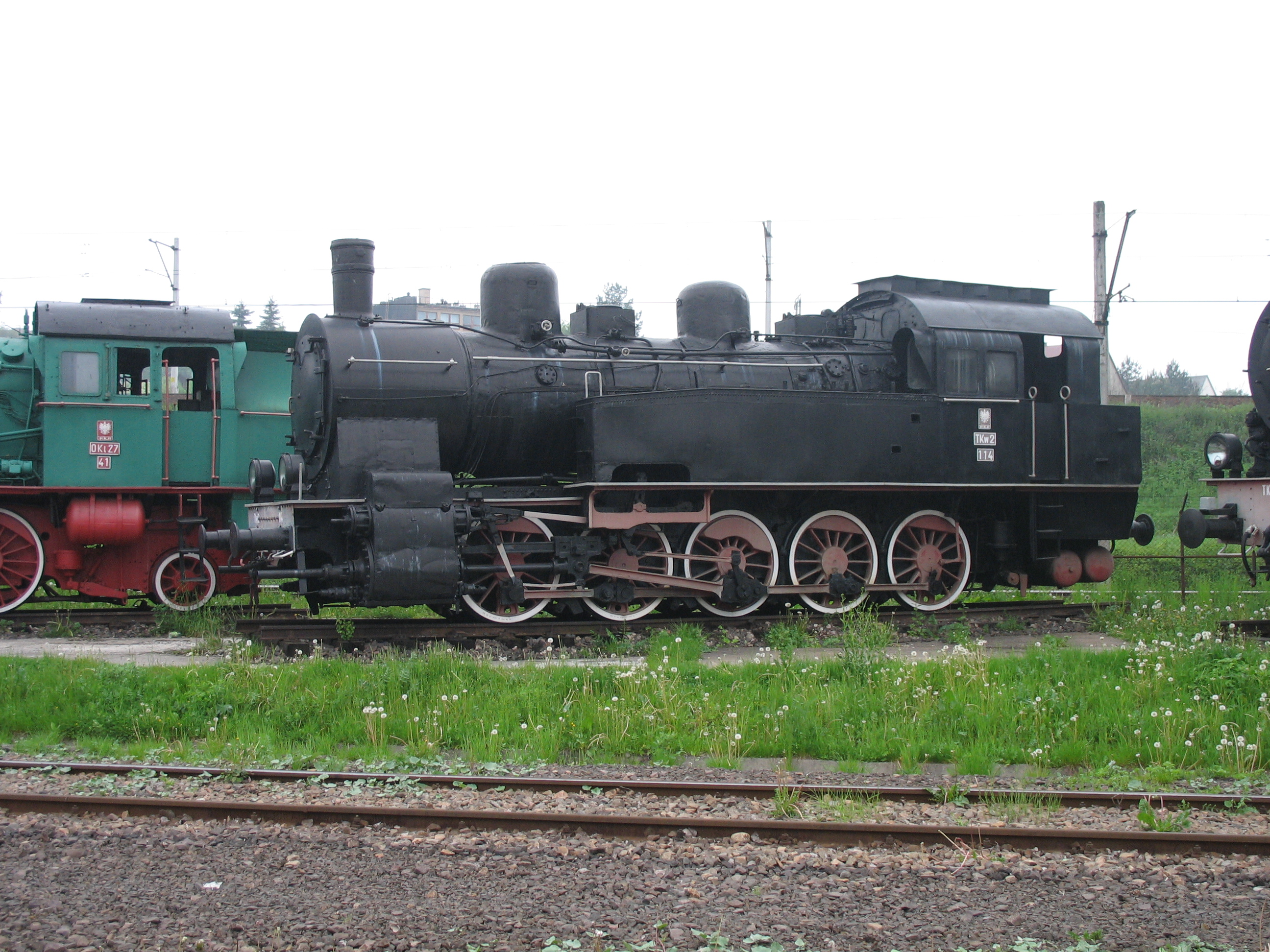 Lokomotywa parowa TKw2-114.